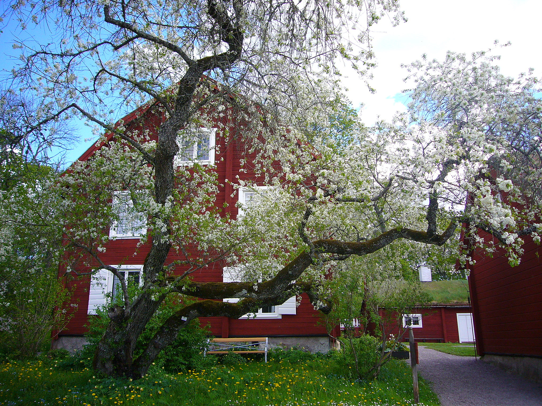 Linnés Hammarby, Uppsala lan